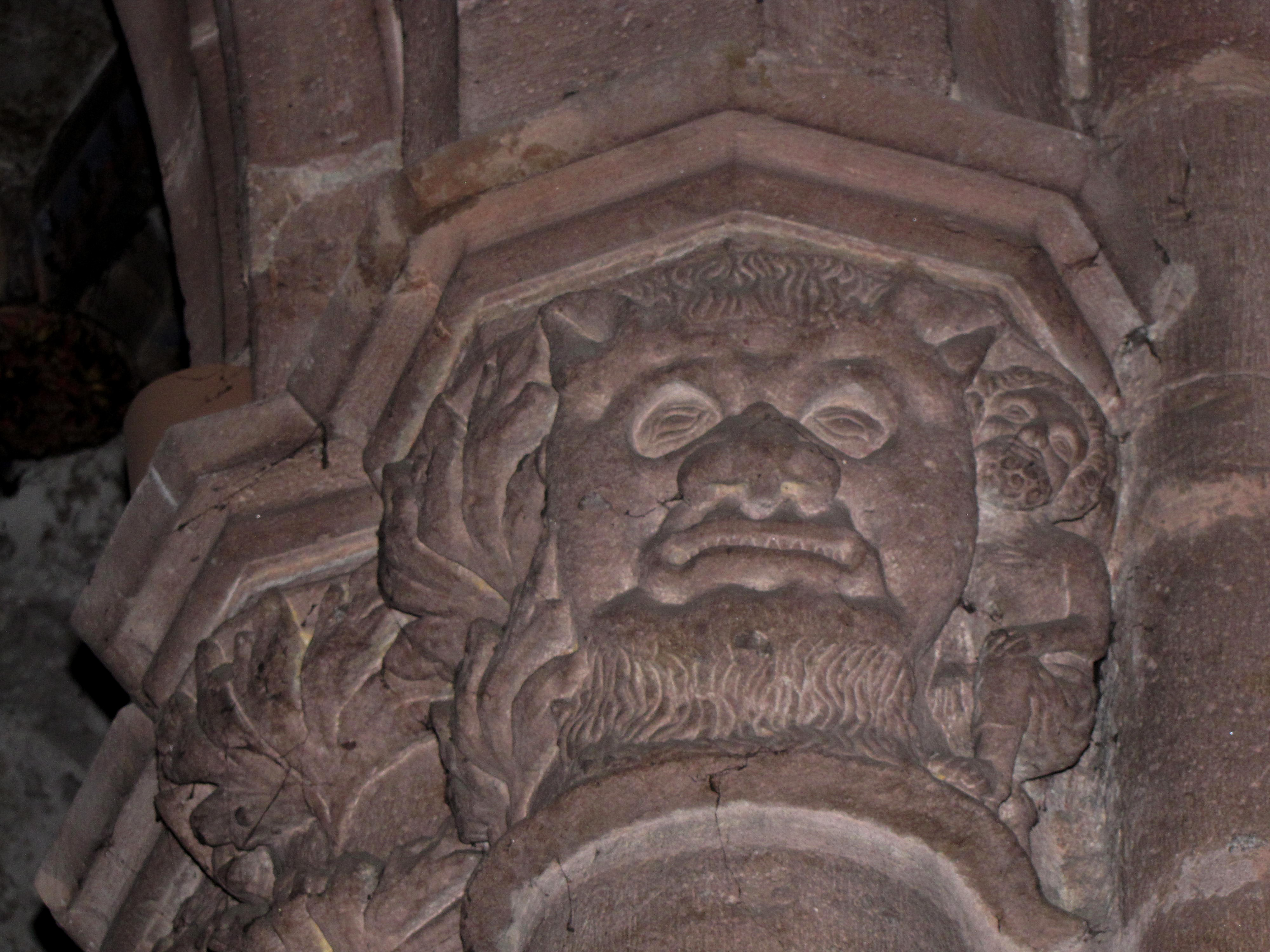 Alsace, Bas-Rhin, Sélestat, Église Saint-Georges (PA00084978, IA00124588). Chapiteau gothique (XIIIe-XIVe)